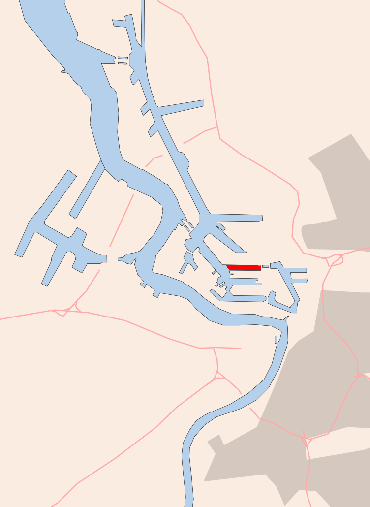 Antwerp , Leopolddok